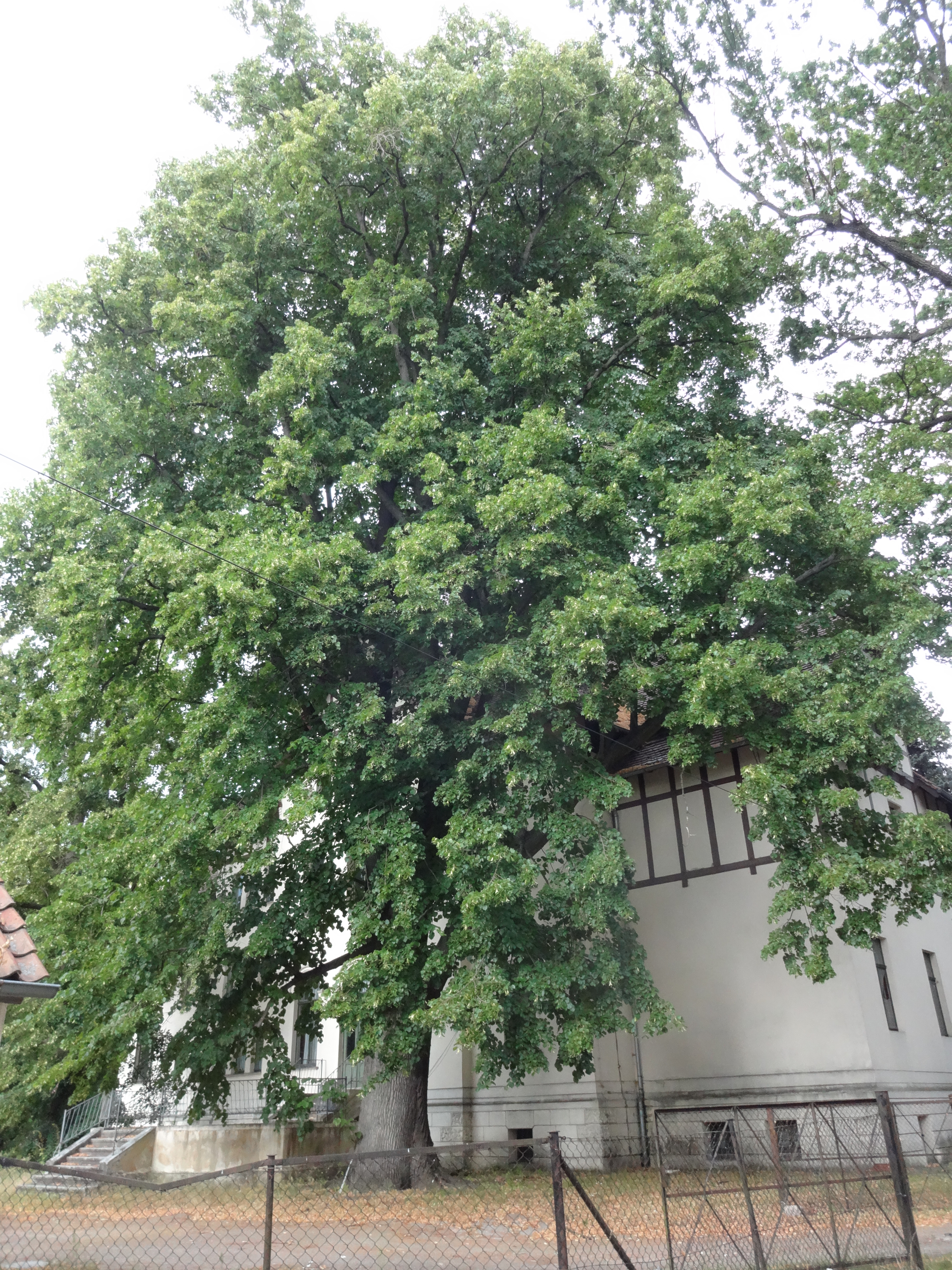 als Naturdenkmal geschützte Sommerlinde am westlich am Gutshaus Lipten